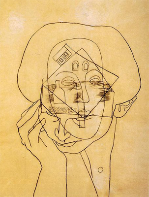 Лайош Вайда, "Голова с домом".